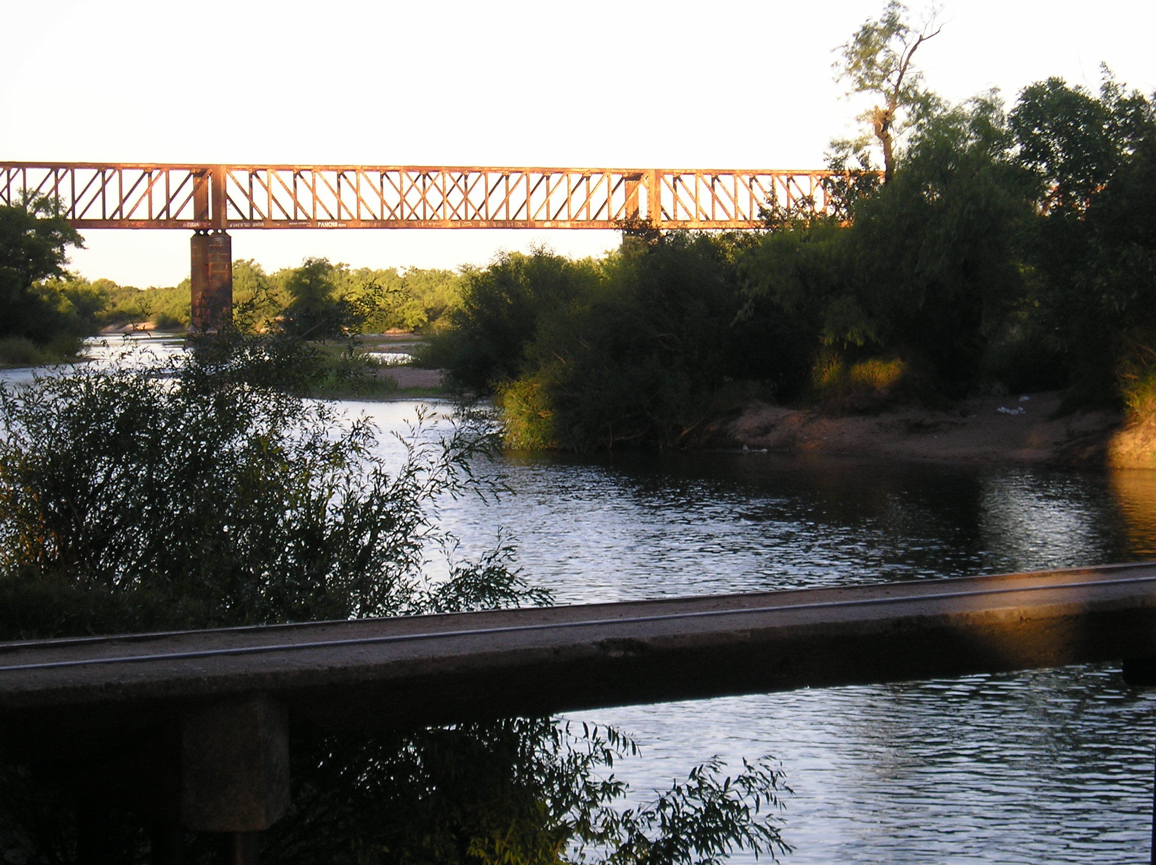 Se observan los dos puentes y la vegetación a los lados del río